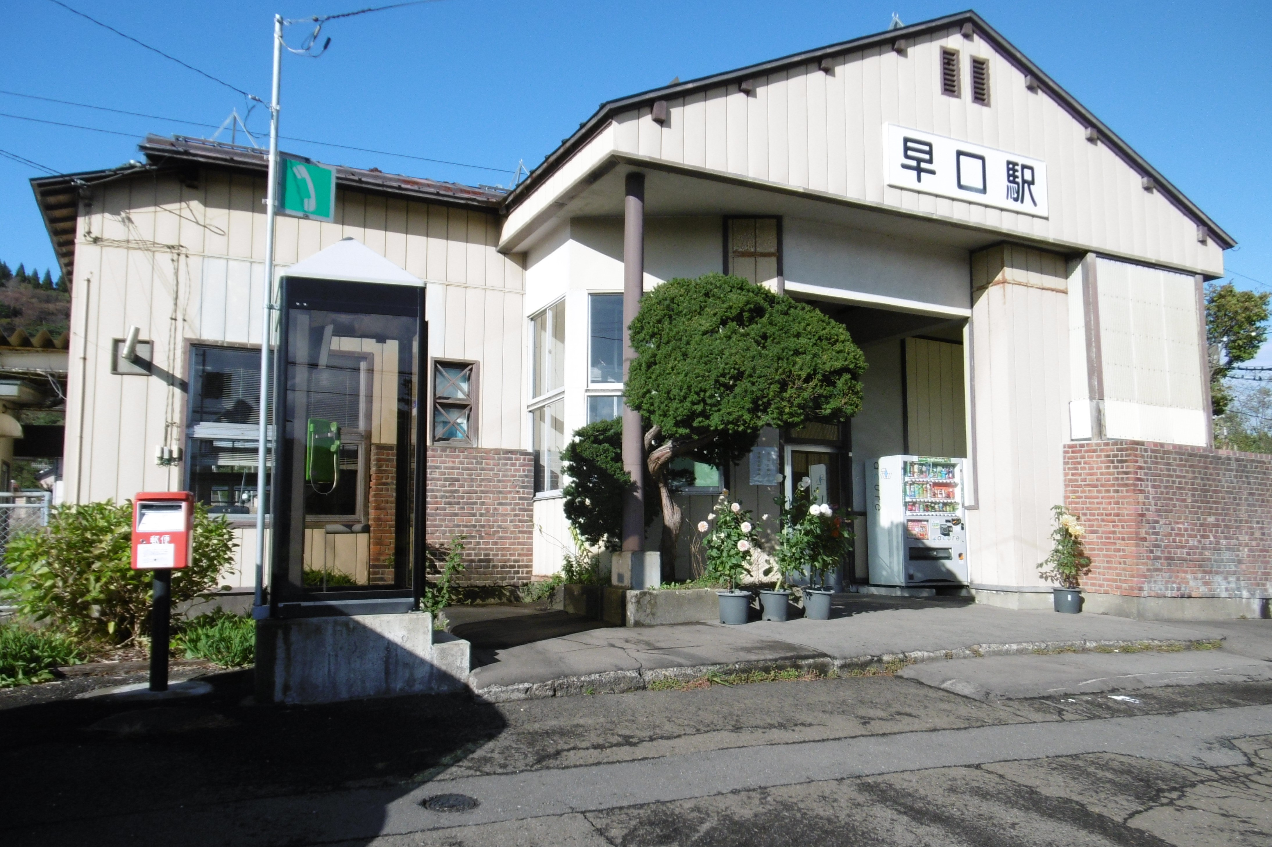 早口駅 駅舎